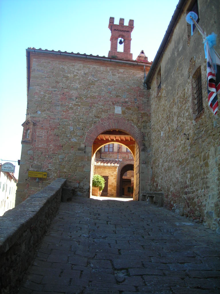 La facciata principale della Grancia di Santa Maria della Scala in Montisi, provincia di Siena, con il portone aperto e, in alto, il campaniletto entro il quale si trova la campanella detta "Martinella".